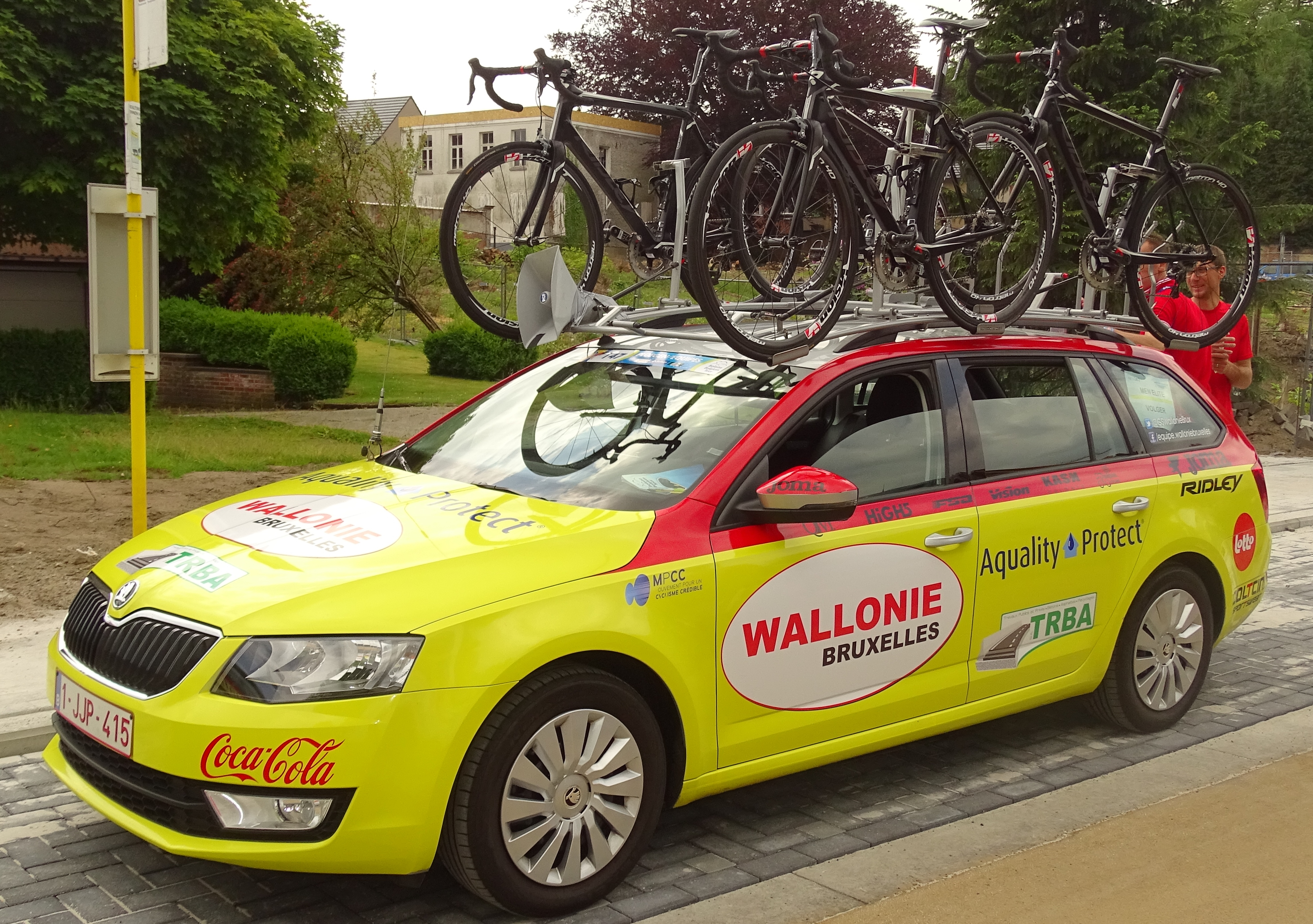 Reportage réalisé le mercredi 27 mai à l'occasion du prologue du Tour de Belgique 2015 à Bornem, Belgique.